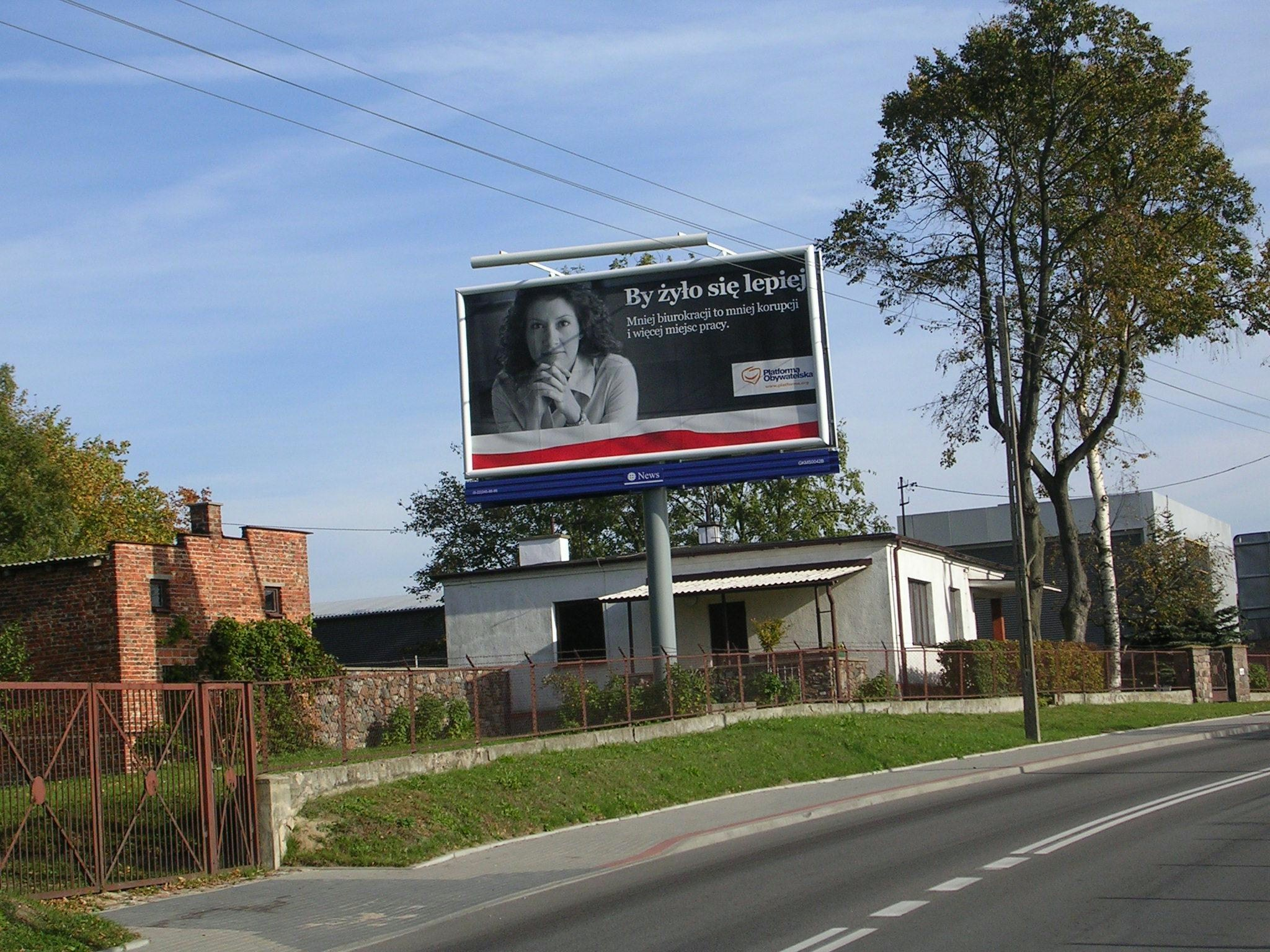 Gdańsk przed wyborami samorządowymi w 2006 roku. Billboard Platformy Obywatelskiej: "By żyło się lepiej".